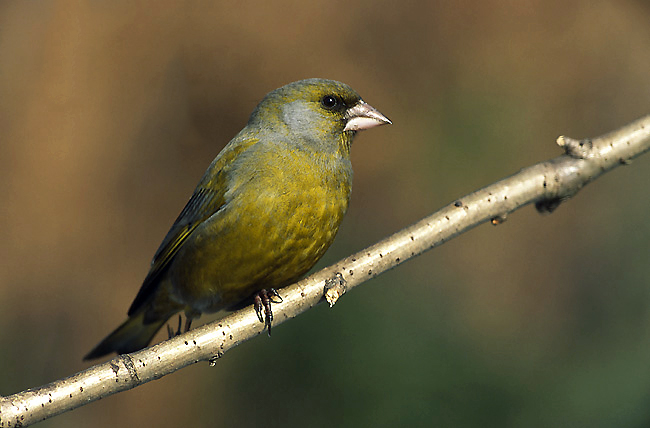 Carduelis chloris